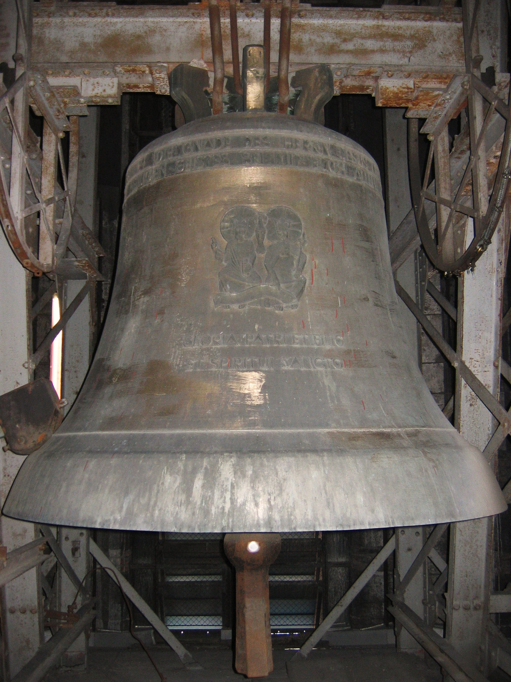 Hosanna (Glocke 1) der Paulskirche in München.